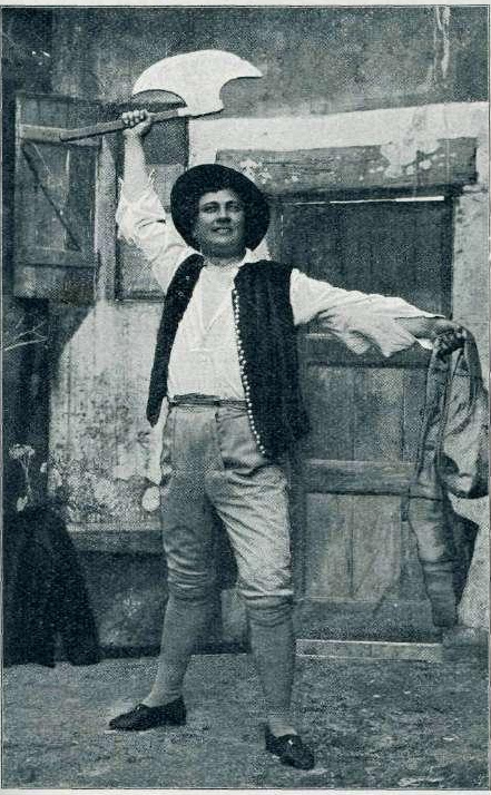 Anton Verovšek kot Martin Krpan.